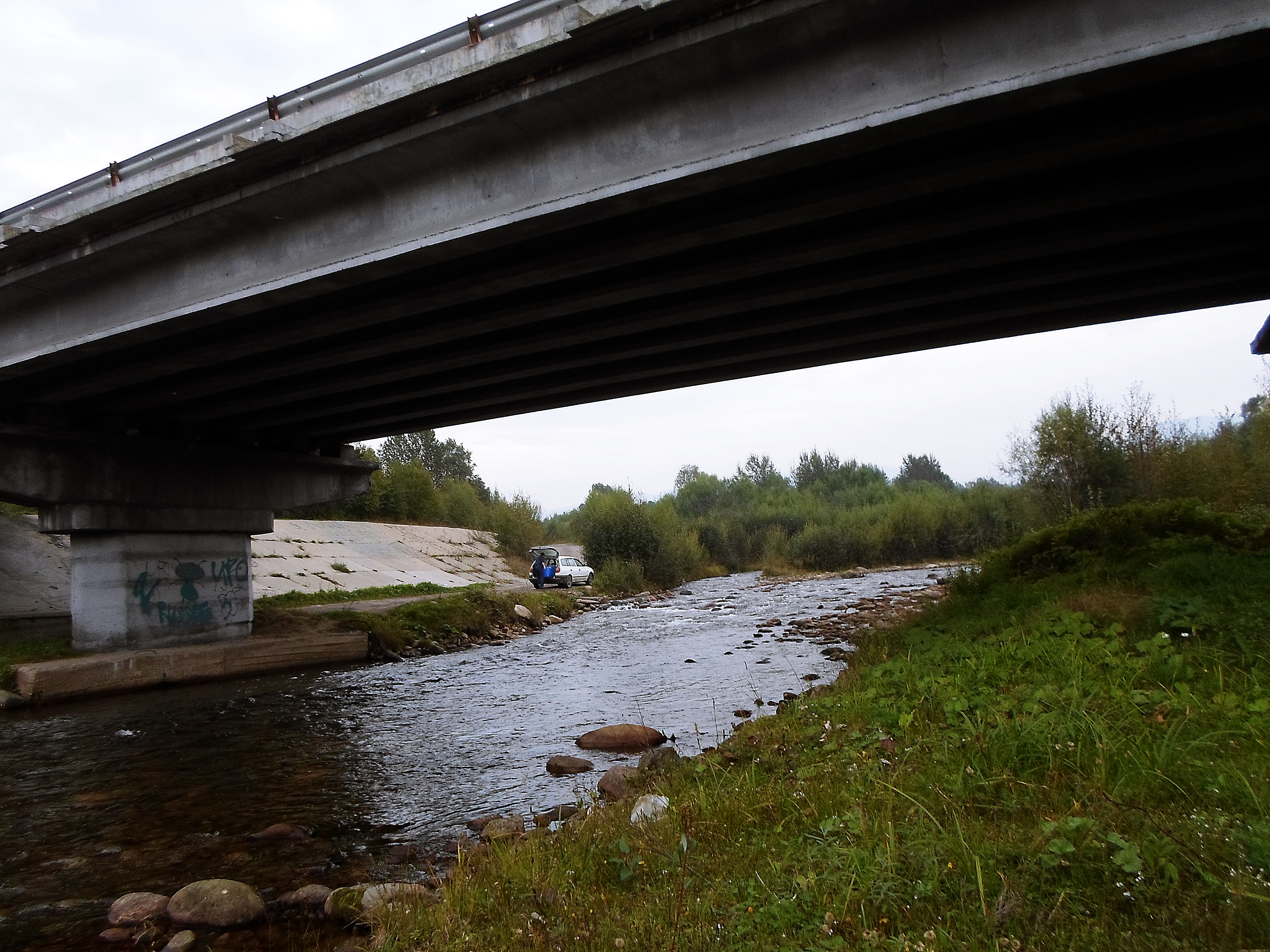 Река Осиновка у моста автомагистрали Р258 "Байкал" на западной окраине посёлка Танхой. Кабанский район Бурятии.